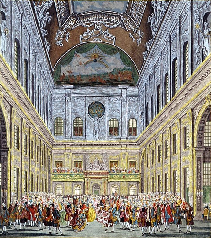 Inkomst van stadhouder Willem V en Wilhelmina van Pruisen te Amsterdam. Illuminatieprent van het bal in de zaal van het stadhuis. signatuur: 4182 - 13c [prent/tekening (diepdruk, kleur)] (Selectie Atlas Van Stolk - 18e eeuw [Atlas Van Stolk, Rotterdam]) komt voor in: Afbeelding der vreugdebedryven en plegtigheden ... te Amsteldam, 30 mey en eenige volgende dagen, des jaars 1768. Amsterdam 1772.